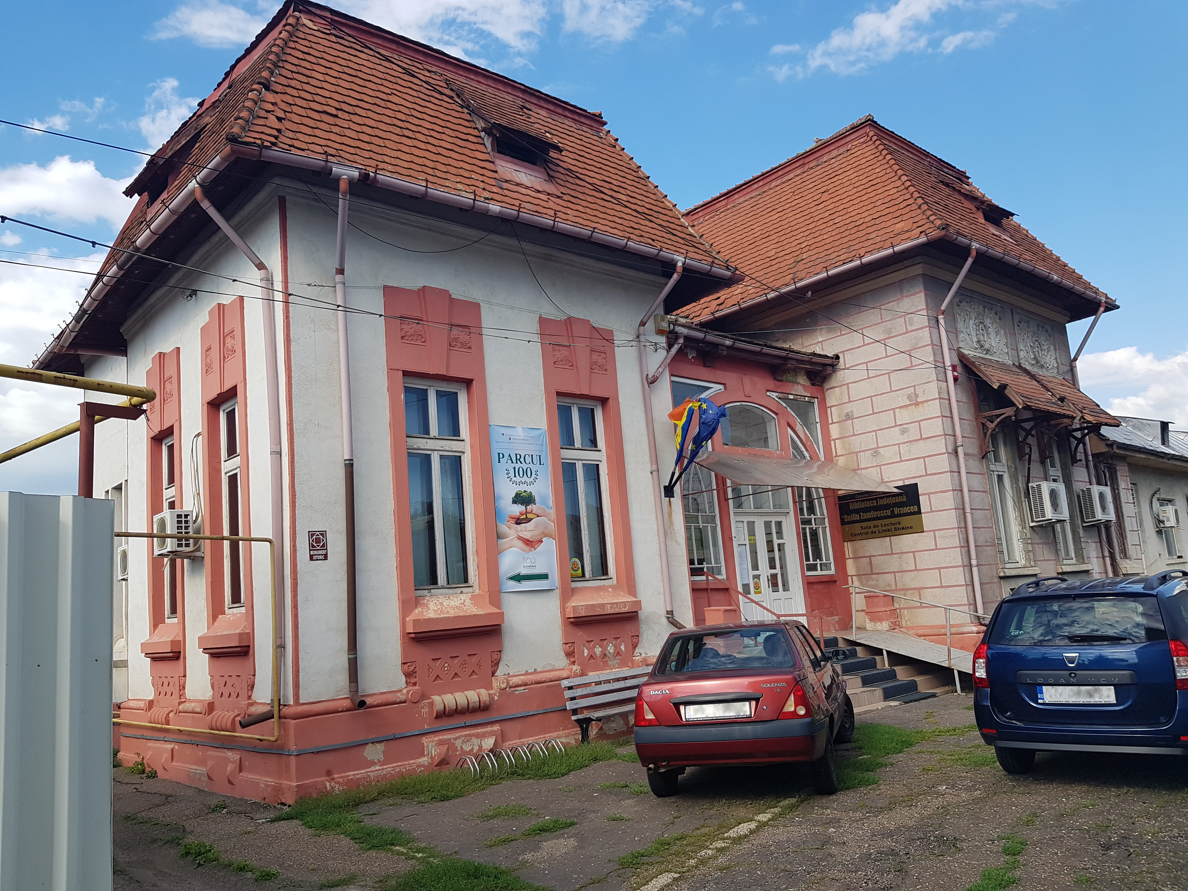 Sală de lectură